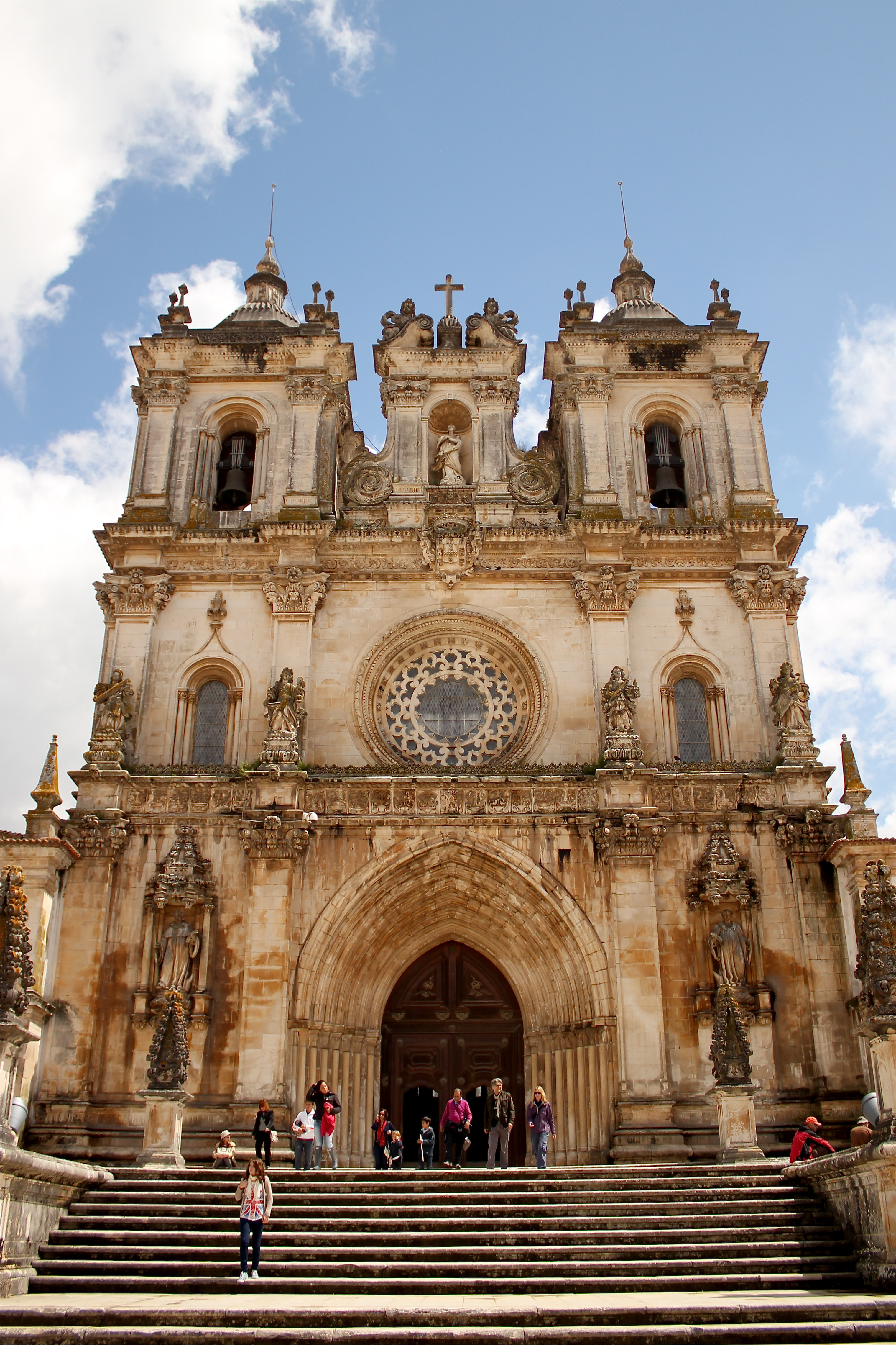 Alcobaça Monastery